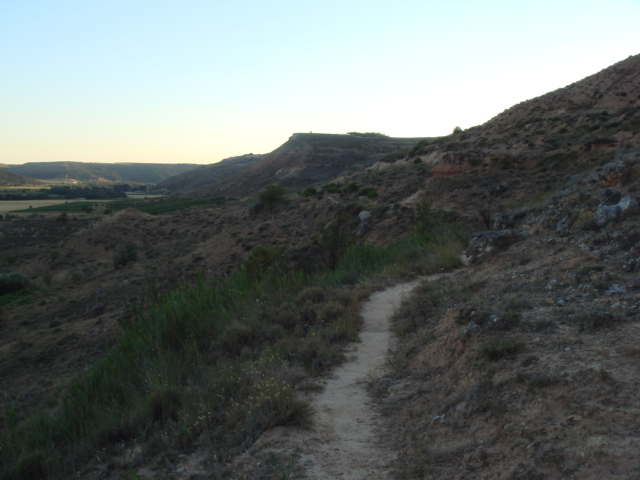 Veredas y caminos llamados Sendas en San Martín de Rubiales (Burgos, España)